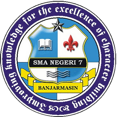 Logo SMAN 7 Banjarmasin